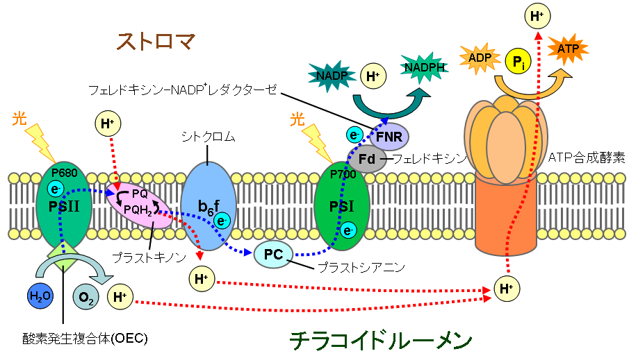 チラコイドの電子伝達系の模式図（日本語版）。